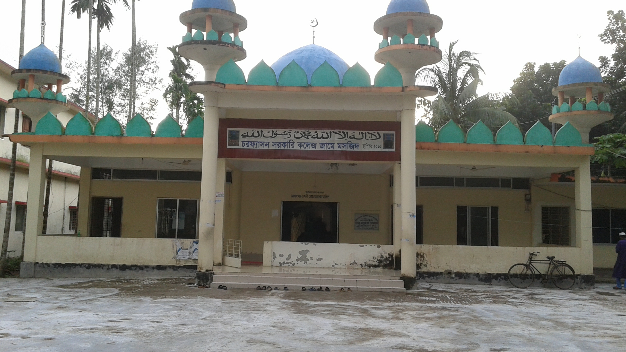 চরফ্যাসন সরকারি কলেজ। জামে মসজিদ।